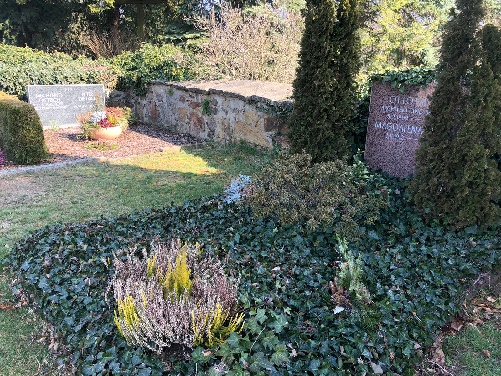 Gräber der Familie Dietrich in Wilthen, links Peter Dietrich und seine Frau Mechthild geb. Aschoff.